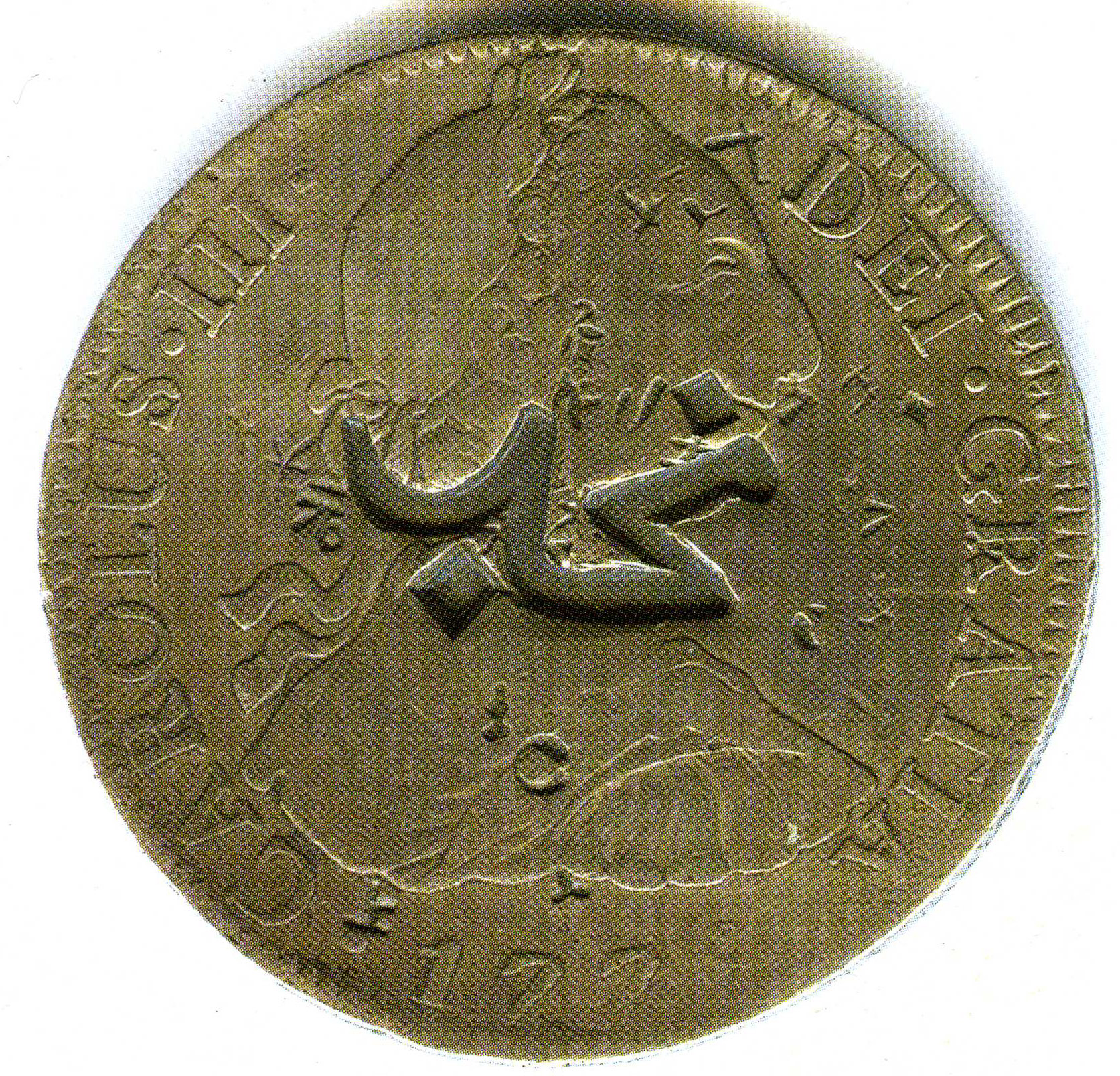 Moneda española de Carlos III con resello en árabe, empleada en Nechd.